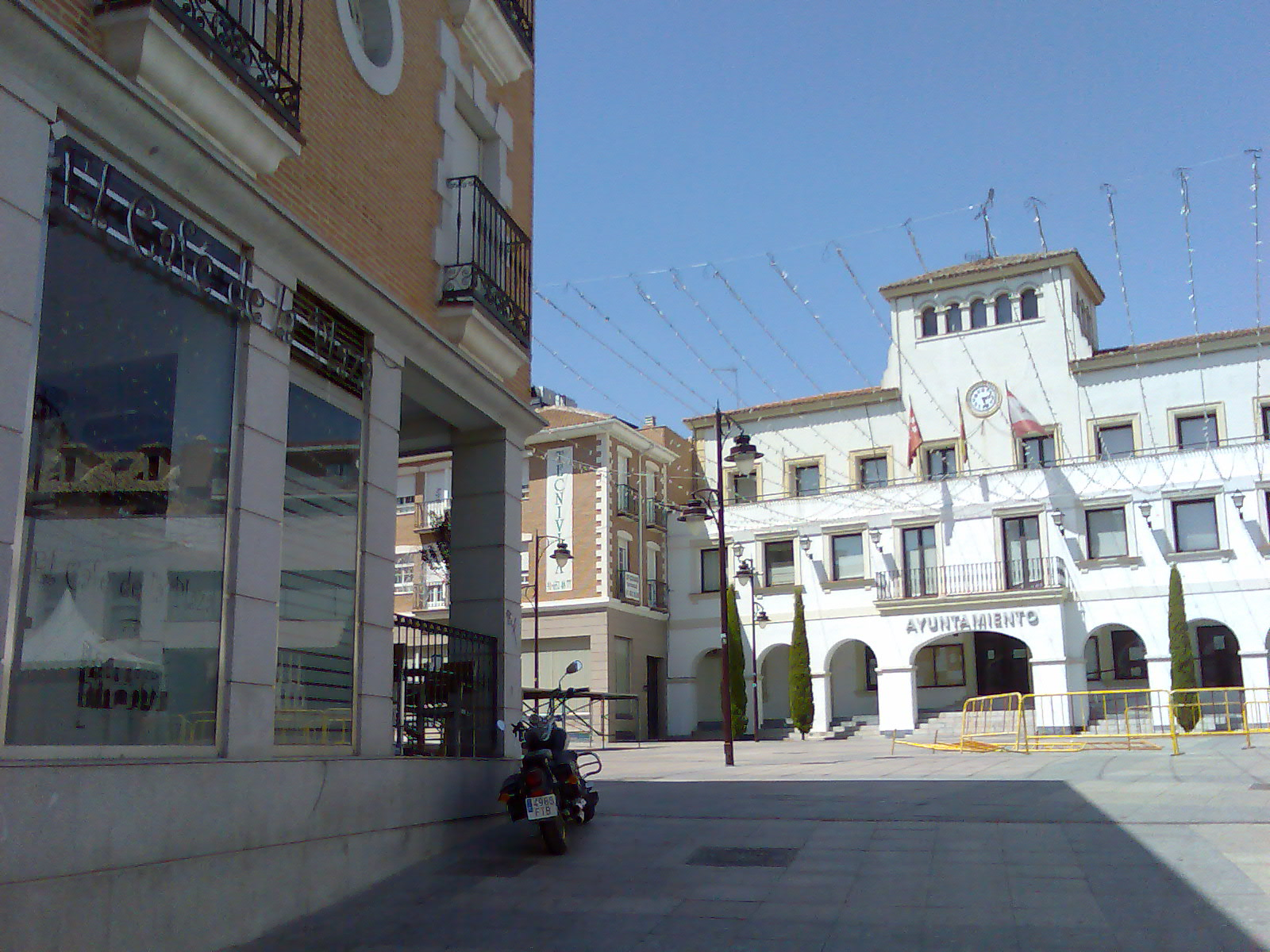 Plaza Mayor en fiestas de San Sebastián de los Reyes. Nota: esta no es la calle Estafeta.